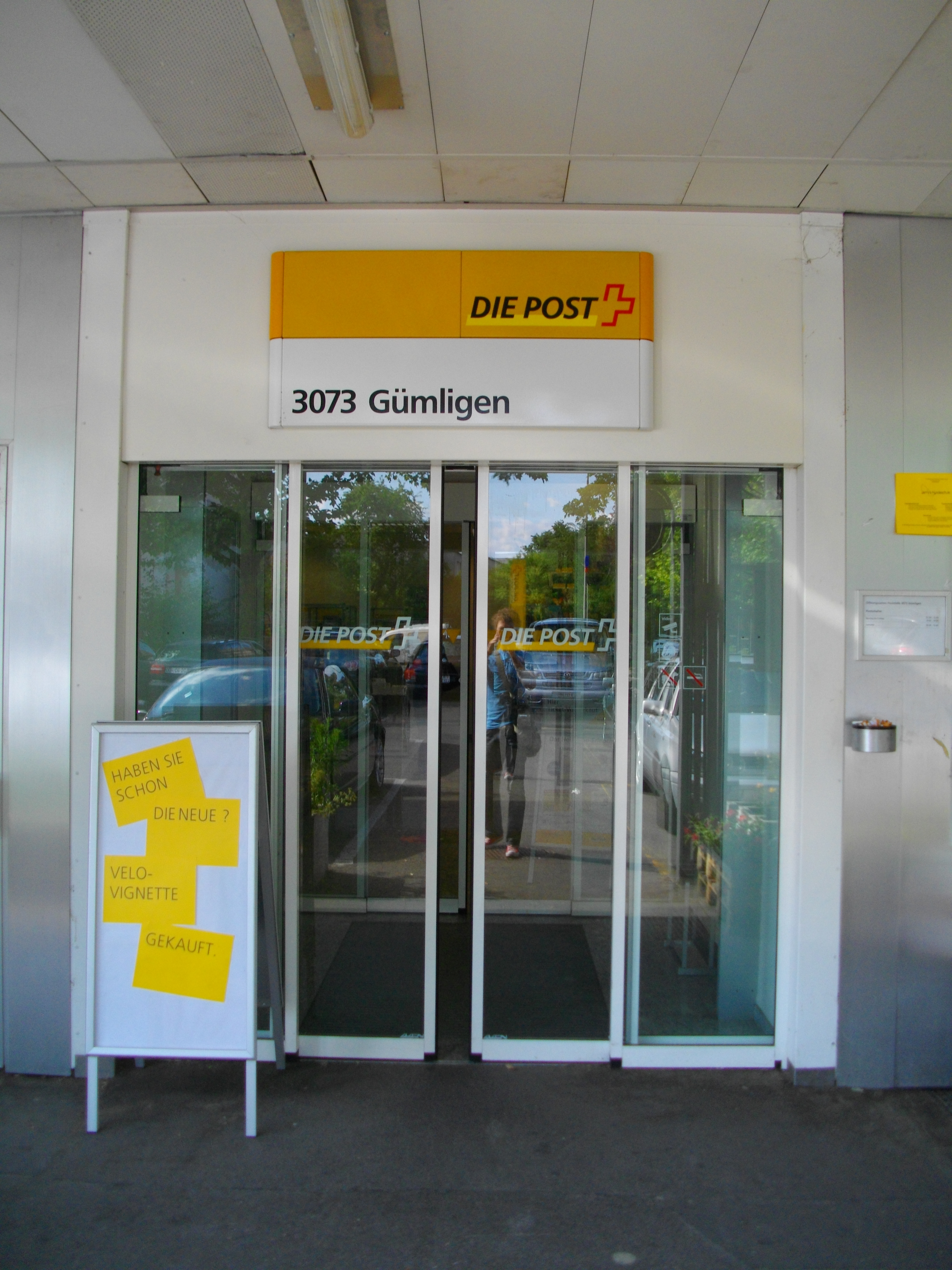 Oficina postal en el centro de Gümligen